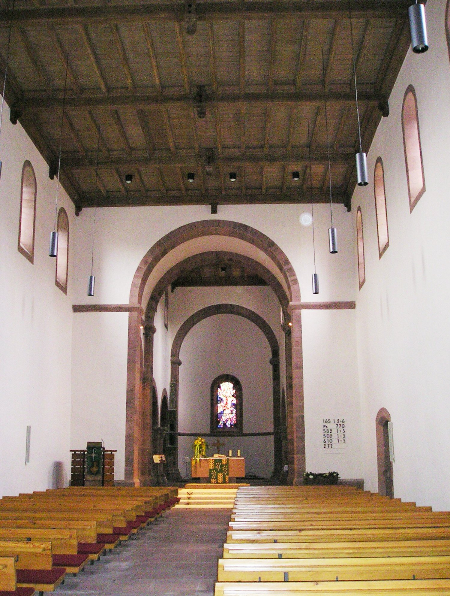 Klosterreichenbach, Kircheninneres